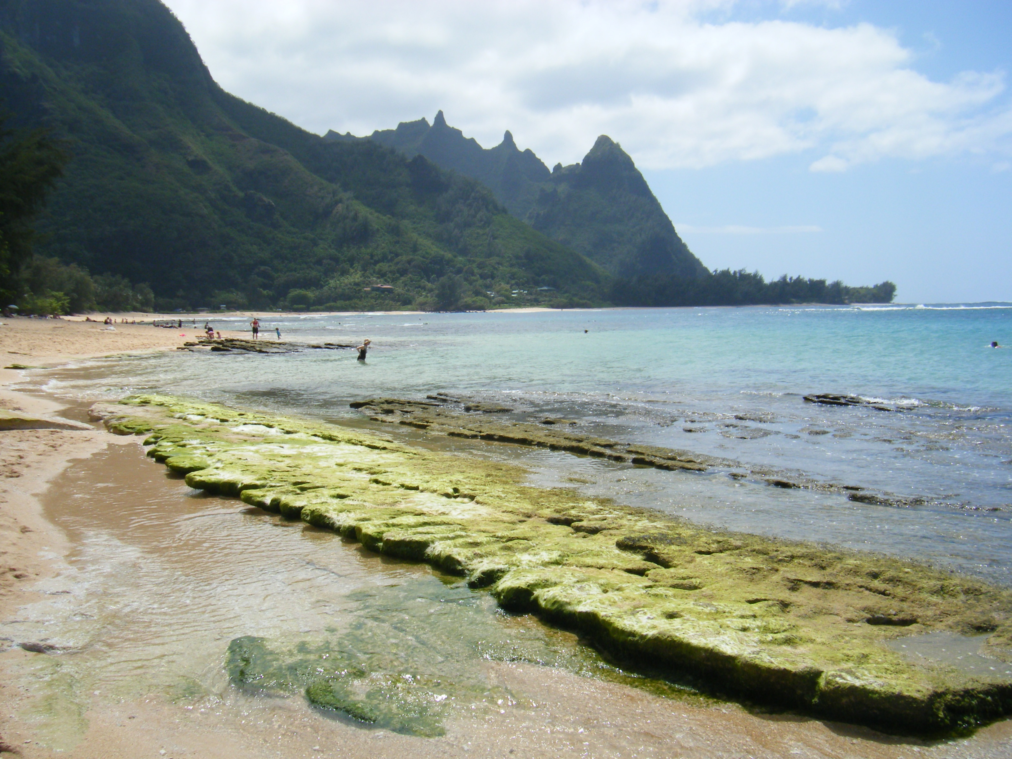 Ha'ena Beach, Kauai, Hawaii